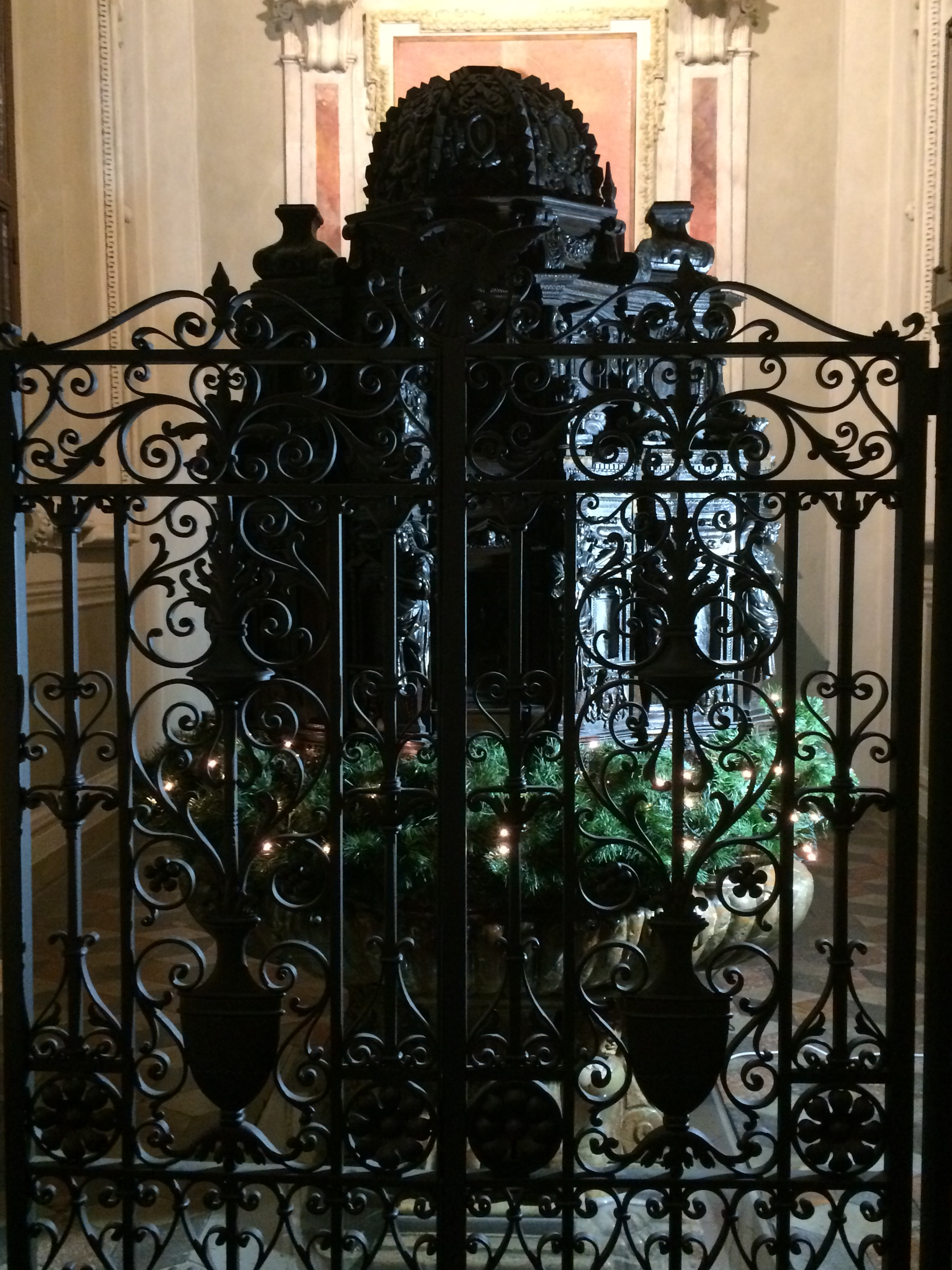 Fonte battesimale della basilica di San Magno